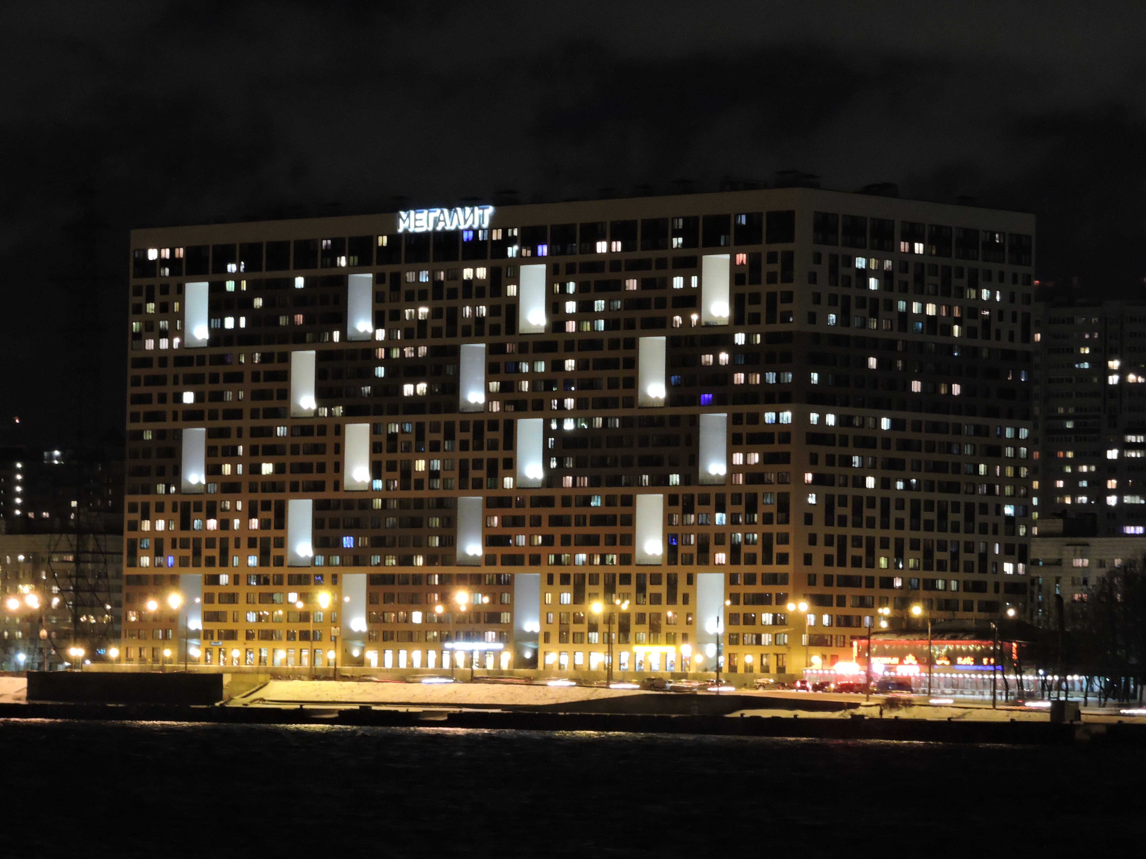 Дом-Мегалит на Неве